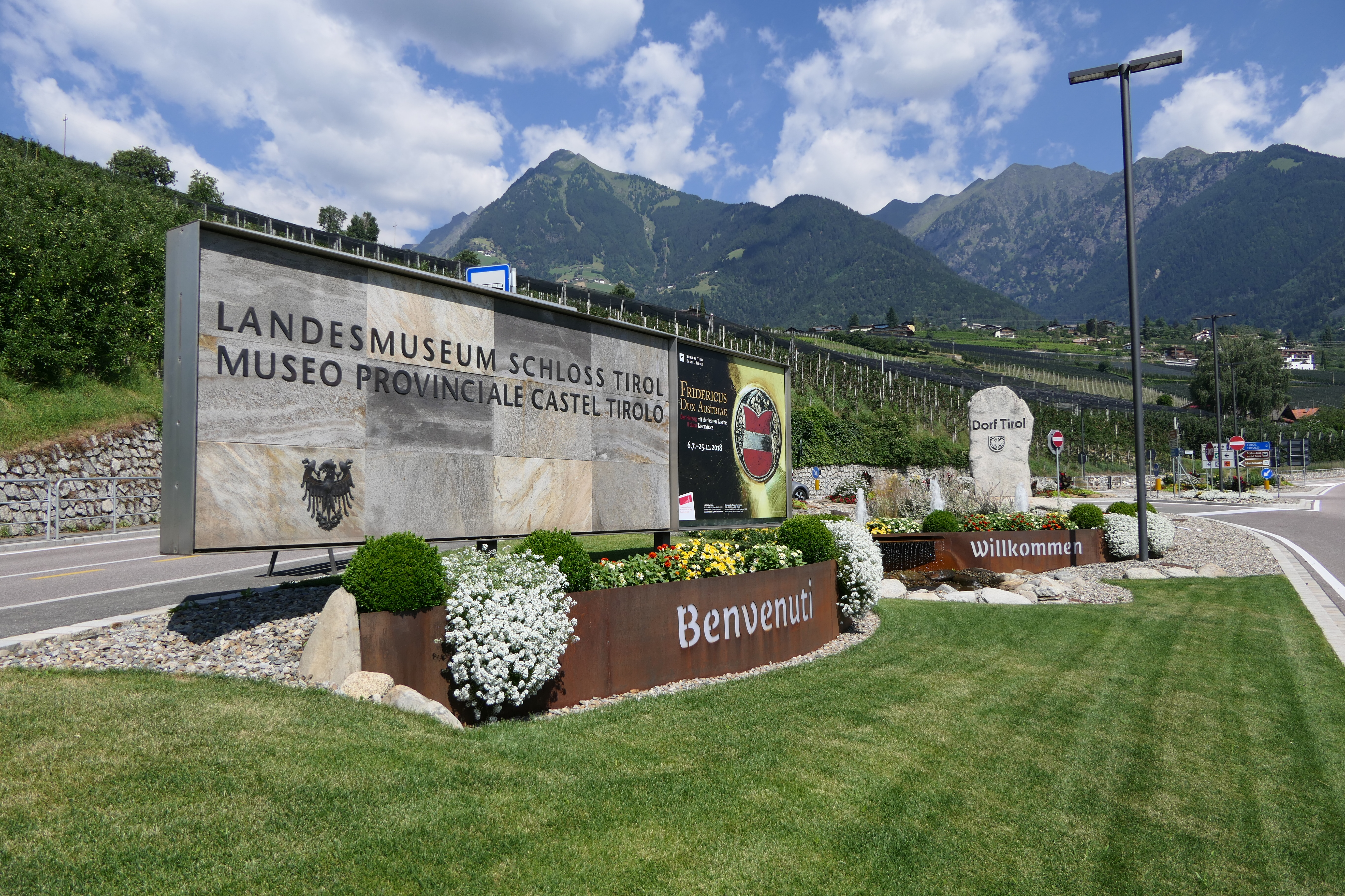 Zufahrt aus dem Passeiertal hinauf nach Dorf Tirol